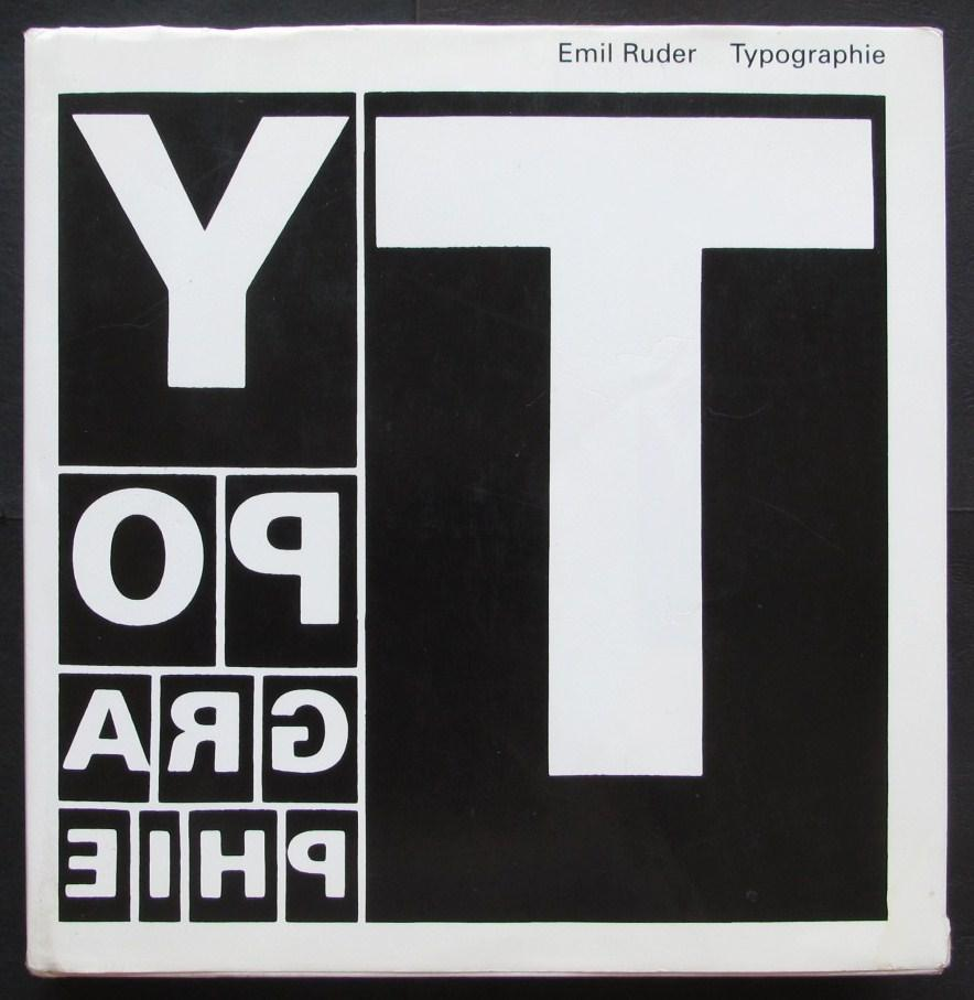 Обложка книги Эмиля Рудера «Typographie»